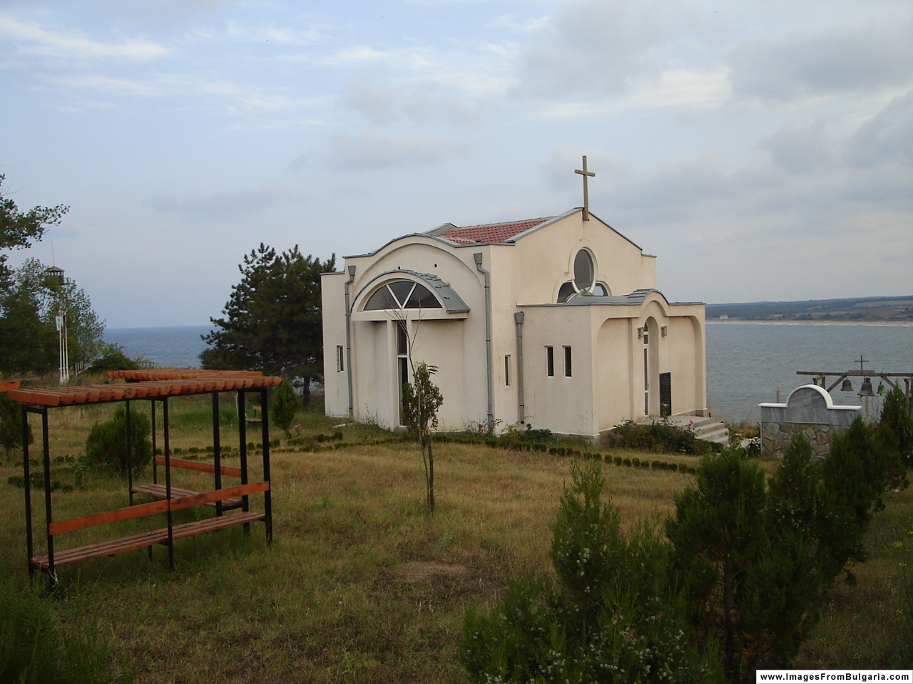 Rezovo, Burgas Province, Bulgaria This file, which was originally posted to , is licensed under Creative Commons Attribution 2.5 License. Attribution: Nikolay Rainov In short: you are free to distribute and modify the file as long as you attribute its author(s) or licensor(s). Check for other images from this website. Този файл, оригинално качен на сайта , е лицензиран под условията на лиценза Creative Commons Признание 2.5. Признание: Nikolay Rainov Накратко: имате свободата да разпространявате и променяте файла, стига да посочвате неговия (неговите) автор(и) или лицензодател(и). Разгледайте други картинки от този уебсайт.